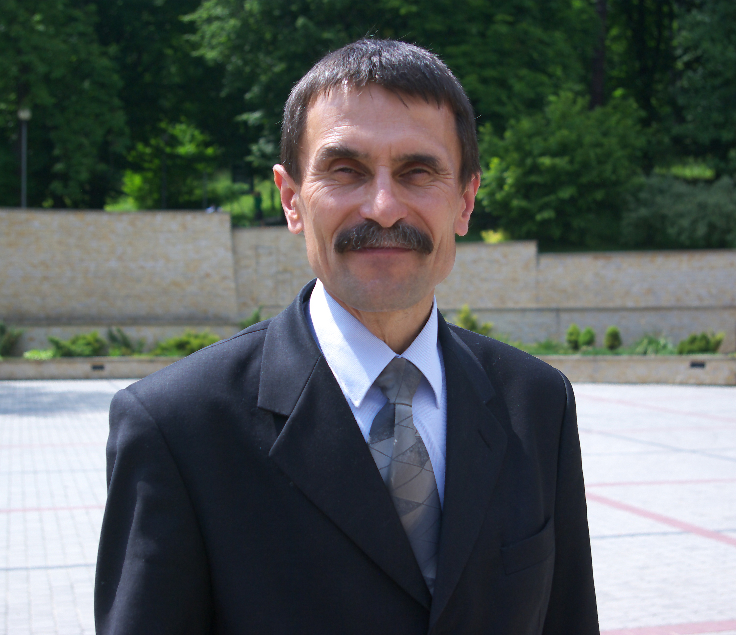 Marian Daszyk podczas uroczystości 125-lecia Towarzystwa Gimnastycznego „Sokół” w Sanoku (7 czerwca 2014)